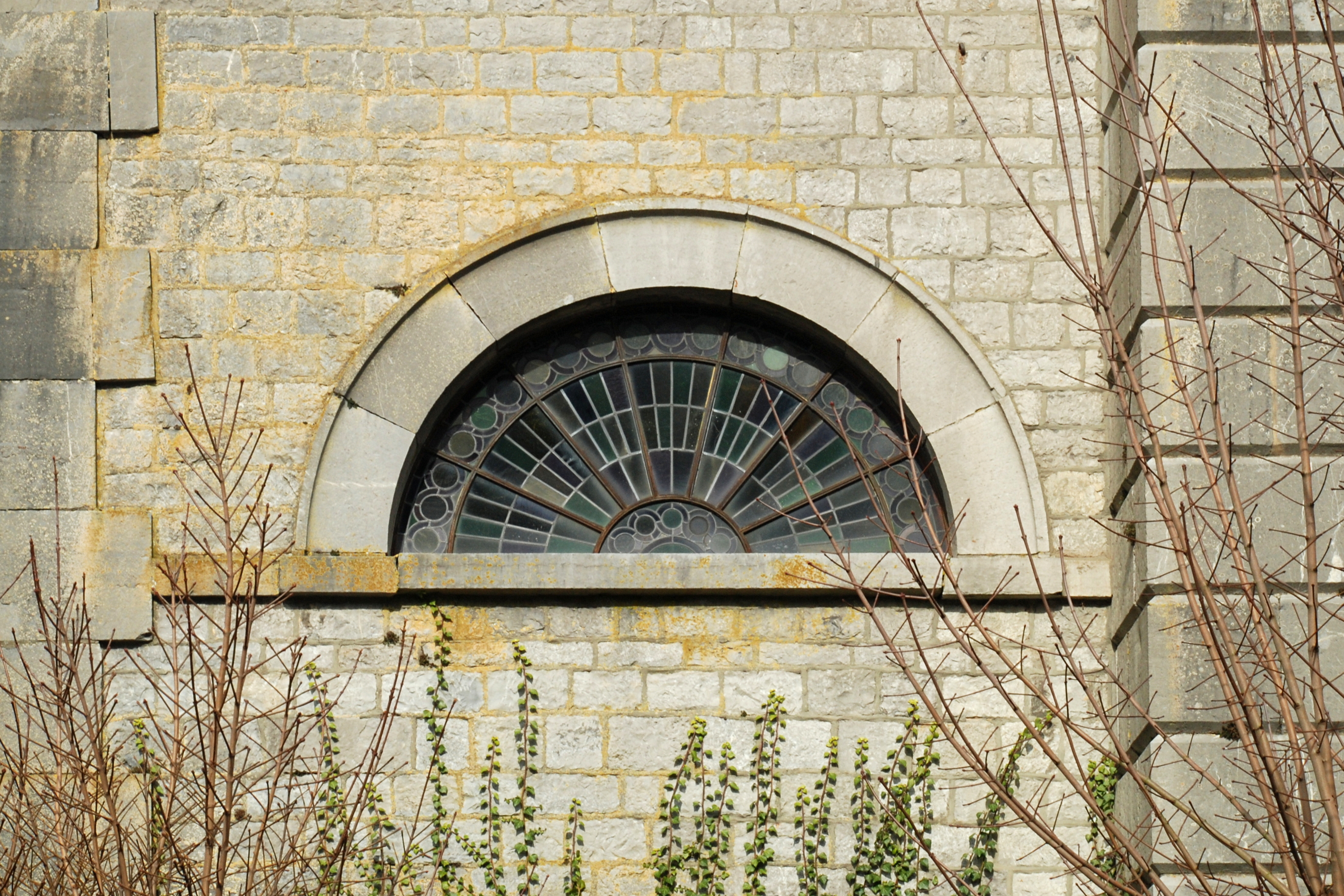 Belgique - Province de Namur - Viroinval - Nismes - église Saint-Lambert (1829)